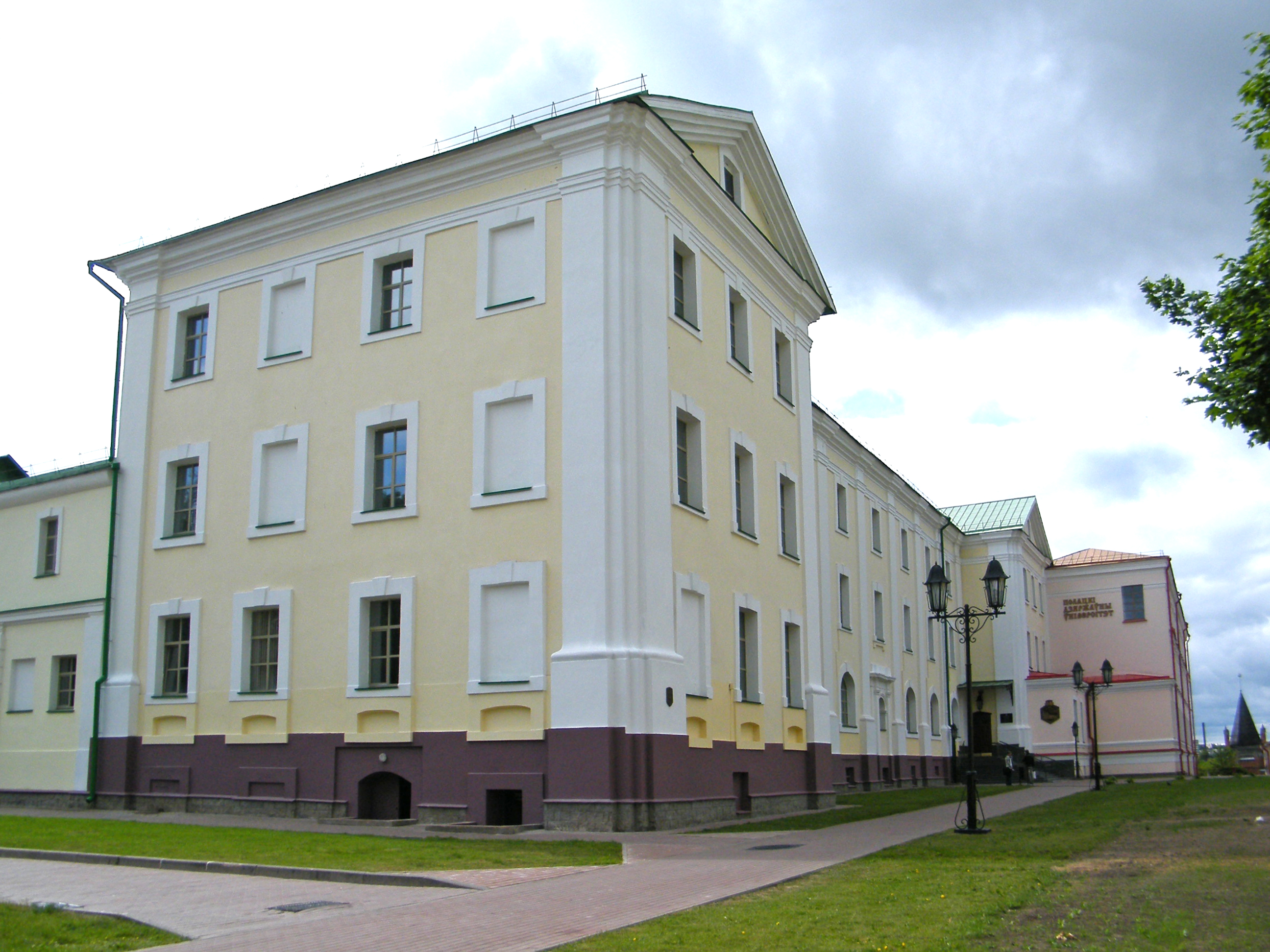 Połock - dawne Kolegium Jezuickie